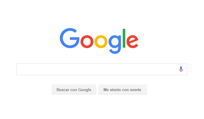 Logo Google